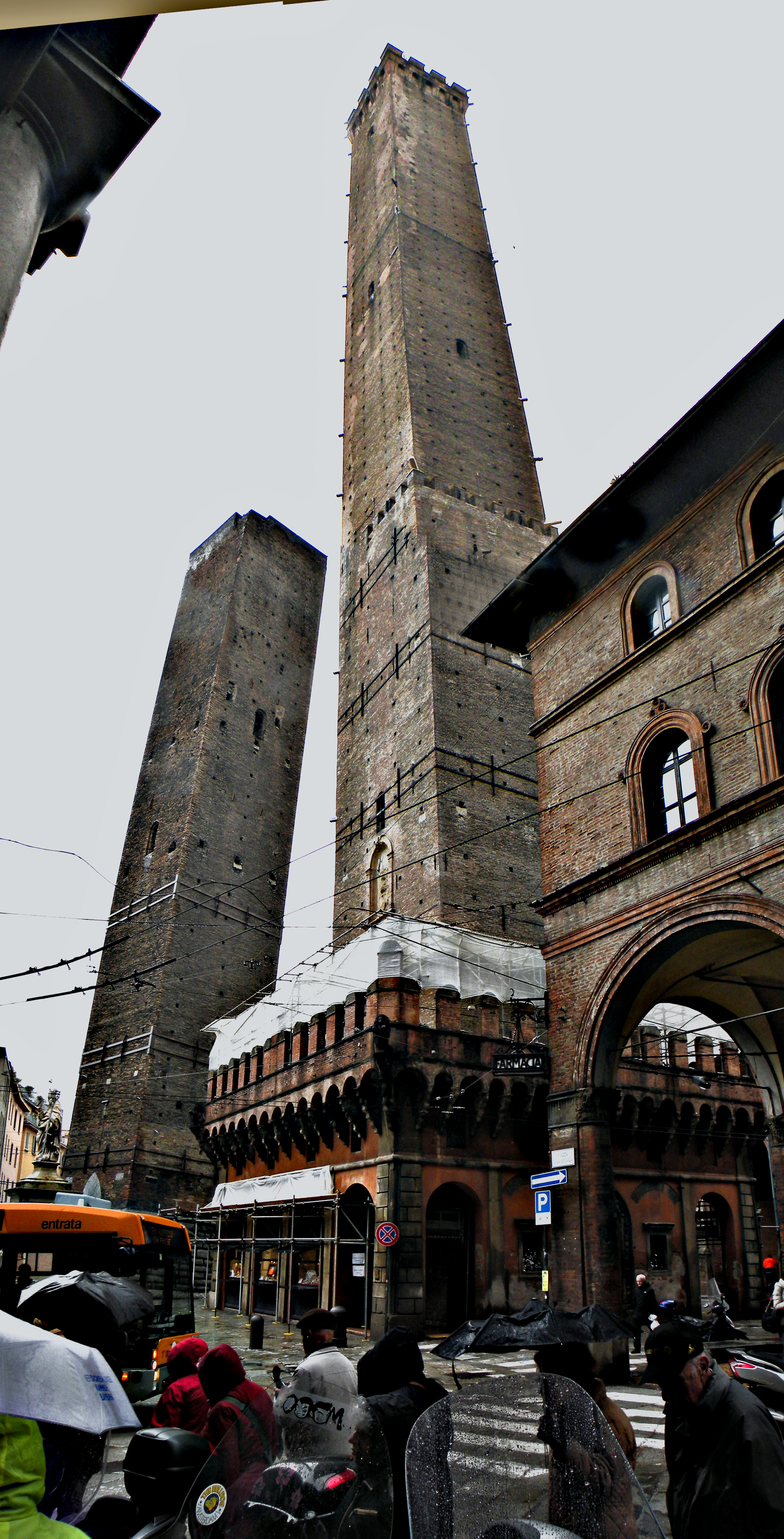 Наклонные башни Болоньи